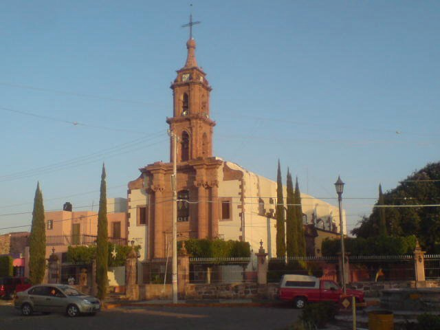 Parroquia Nuestra Señora de Guadalupe, Quiringuicharo,Michoacan